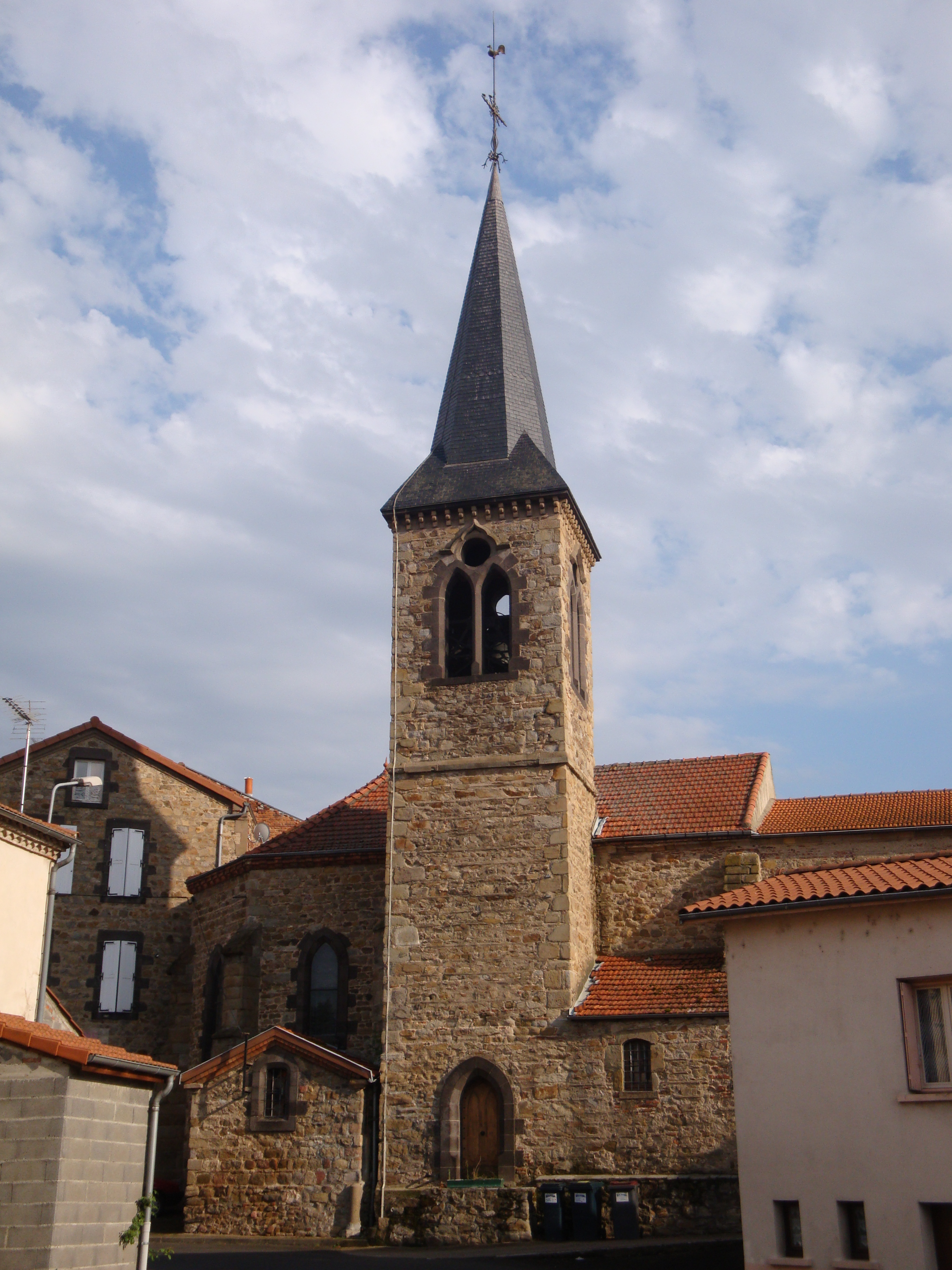 Église de la commune de Vergongheon (43360), Haute-Loire, France.